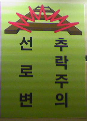 좌종서(행갈이를 왼쪽에서 오른쪽으로 하는 세로쓰기)로 씌어진 한국어 경고문.